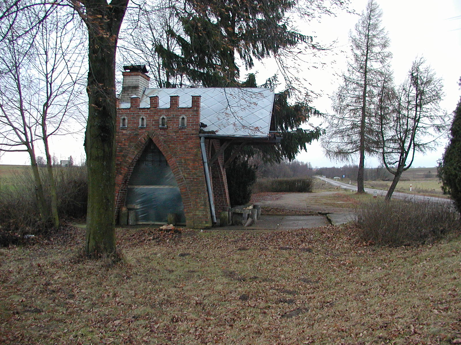 kominek przy granicy na drodze Lipszczany-Sofijewo